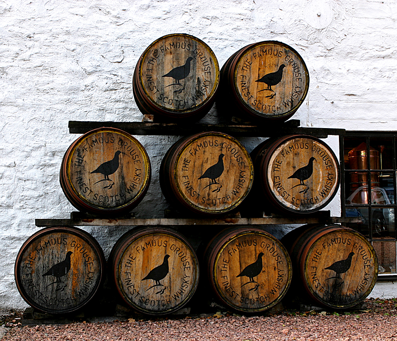 Autore= Paul Watson [1] Fonte= Flickr [2] Descrizione= Barili di The Famous Grouse Licenza=CC BY-SA 2.0 Note=